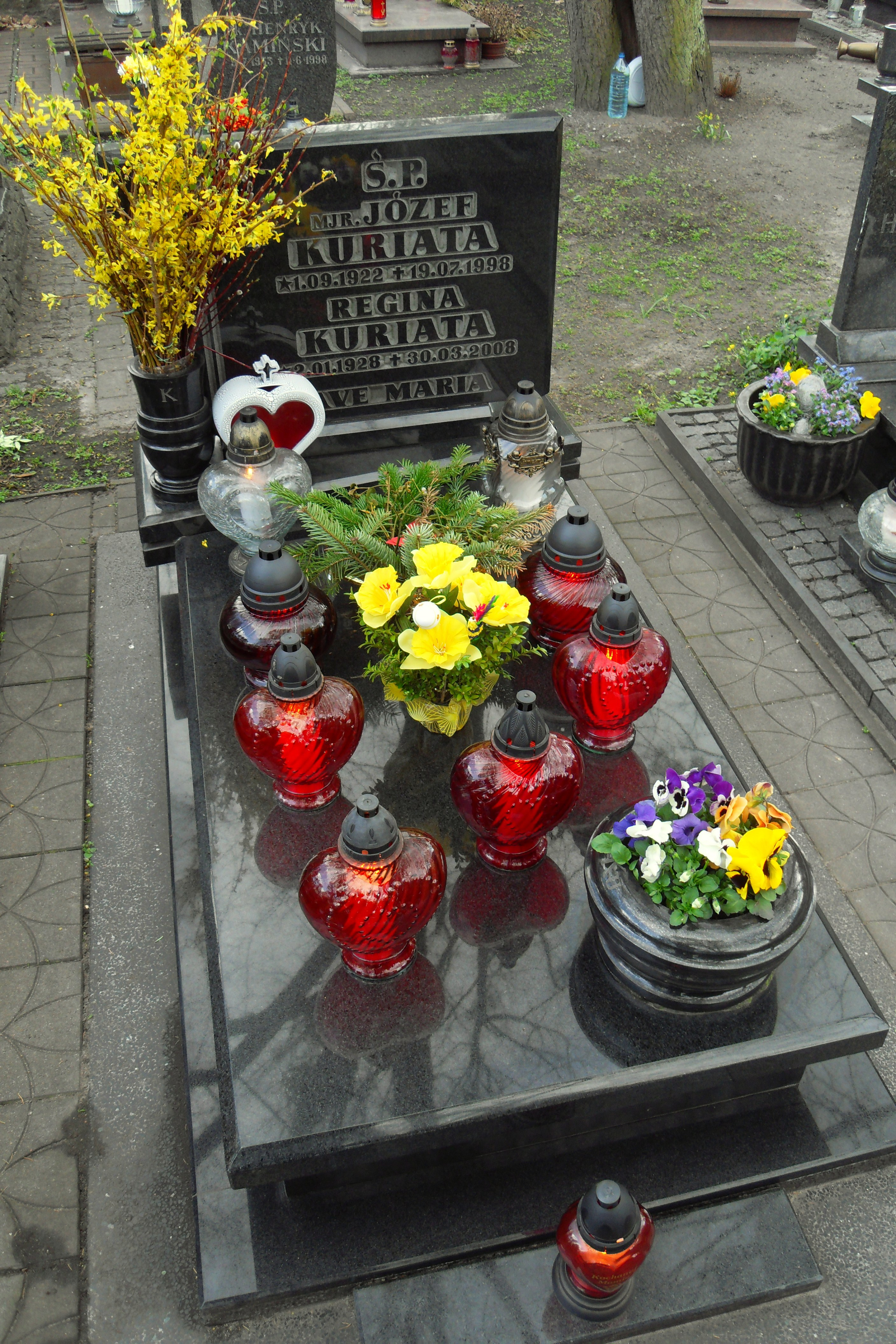 Gdańsk Aniołki. Cmentarz Garnizonowy, grób Józefa Kuriaty.